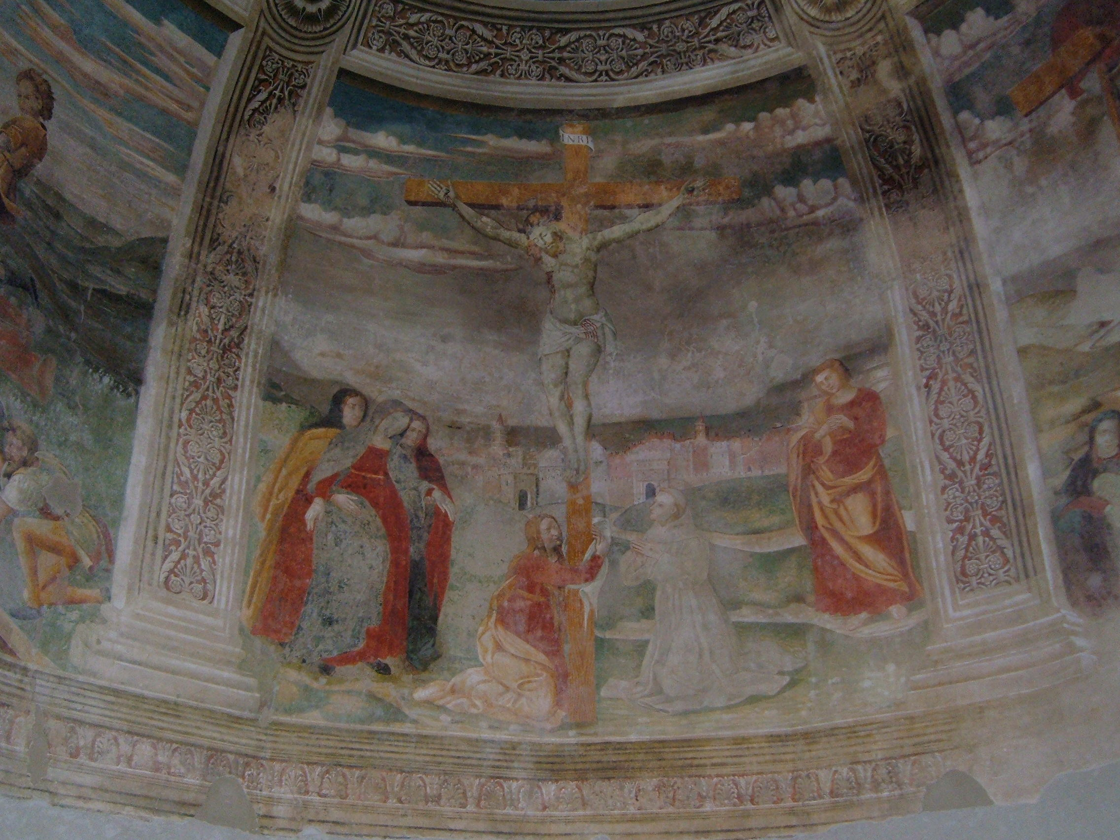 Affresco absidale della Crocefissione. Sullo sfondo, Tortoreto come appariva nei primi anni del '500.